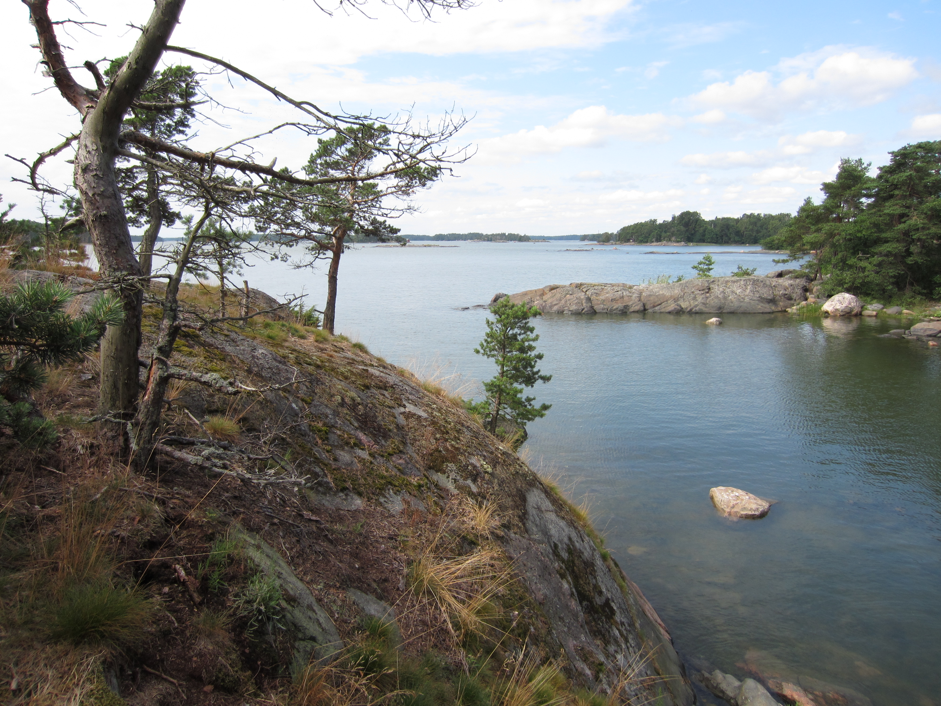 Helsinki, Ausflug mit Kanu zur Insel Kalliosaari